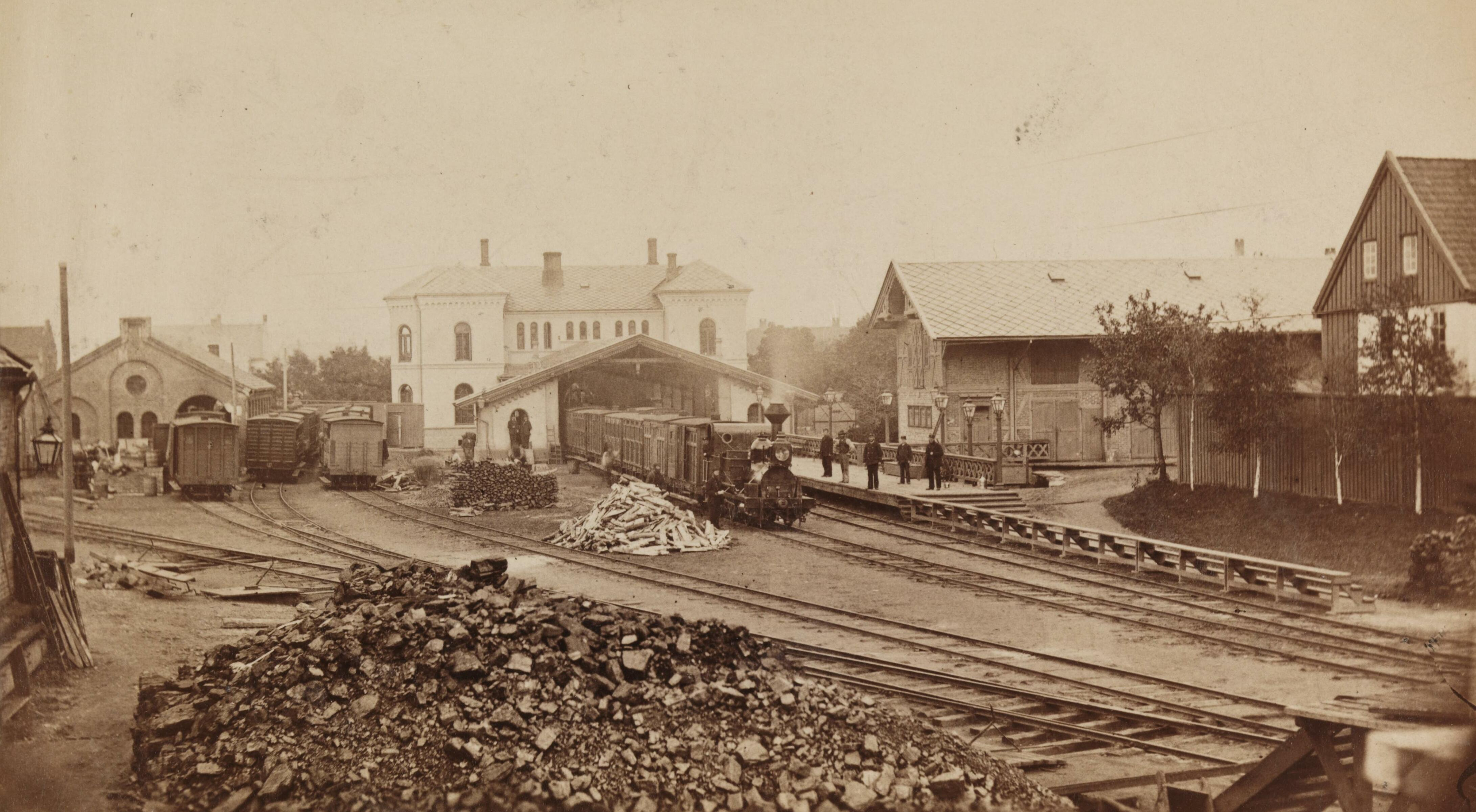 Bildet er hentet fra Nasjonalbibliotekets bildesamling. Anmerkninger til bildet var: Tittel etter påskrift på komponentnr 1 Trondheim sentralstasjon, Trondheim, Sør Trøndelag